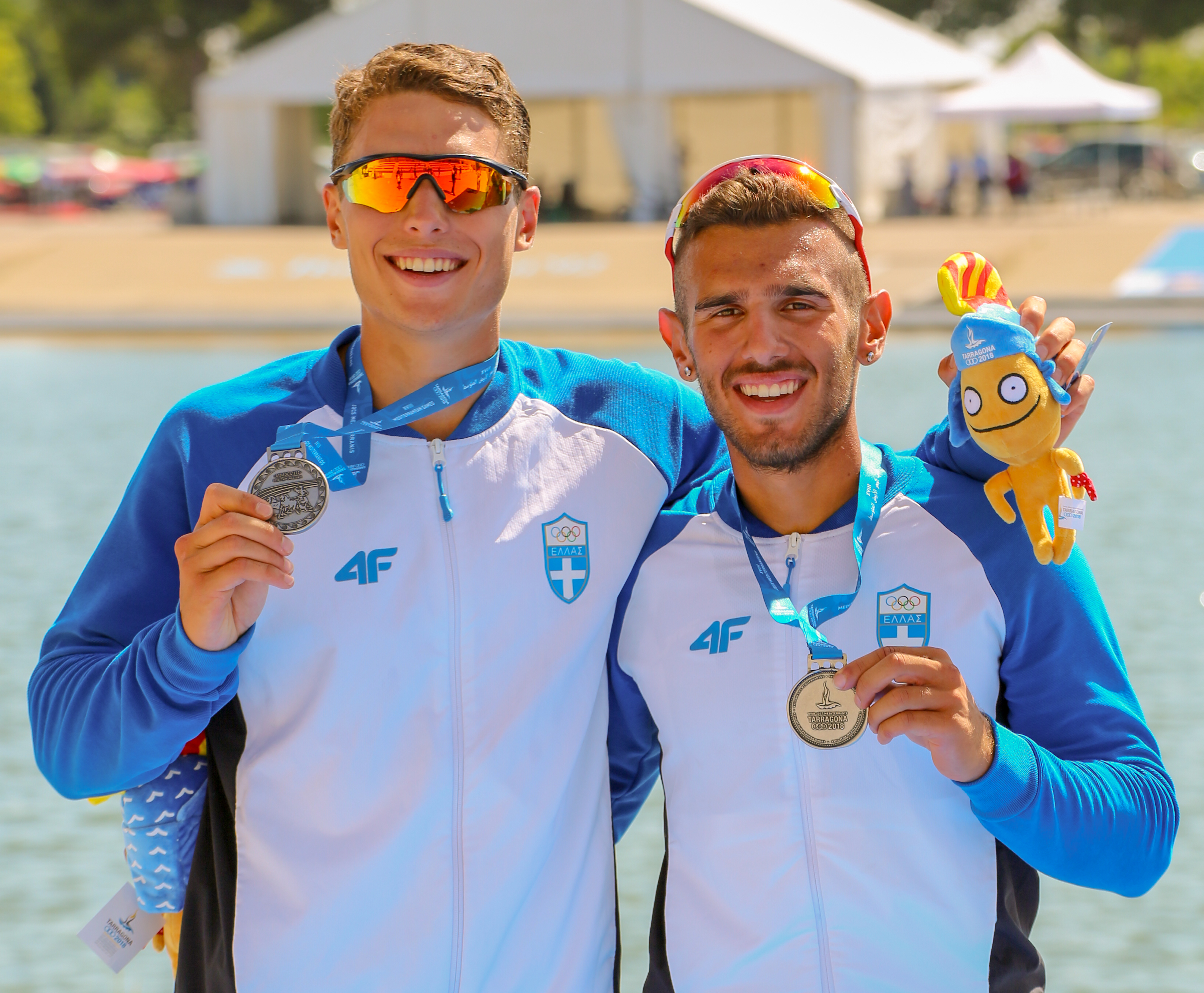 Ioannis Marokos y Nino Nikolaidis, plata en los Juegos del Mediterráneo 2018